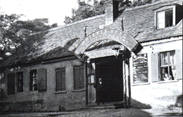 Ahlerts-Berg, Spielstätte des Sommertheaters in Brandenburg an der Havel, 1912 geschlossen und abgerissen